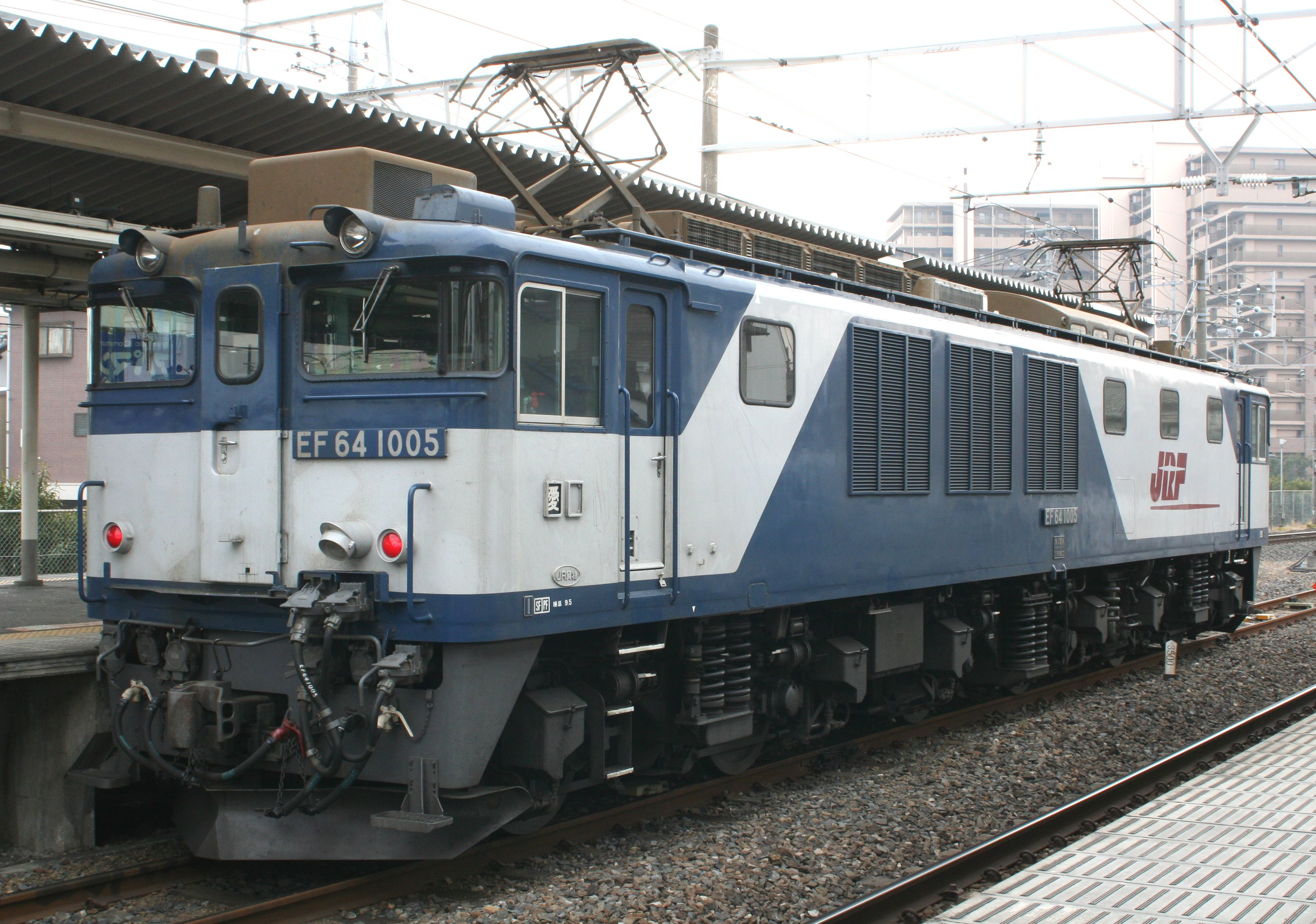 EF64型電気機関車 白岡駅で撮影